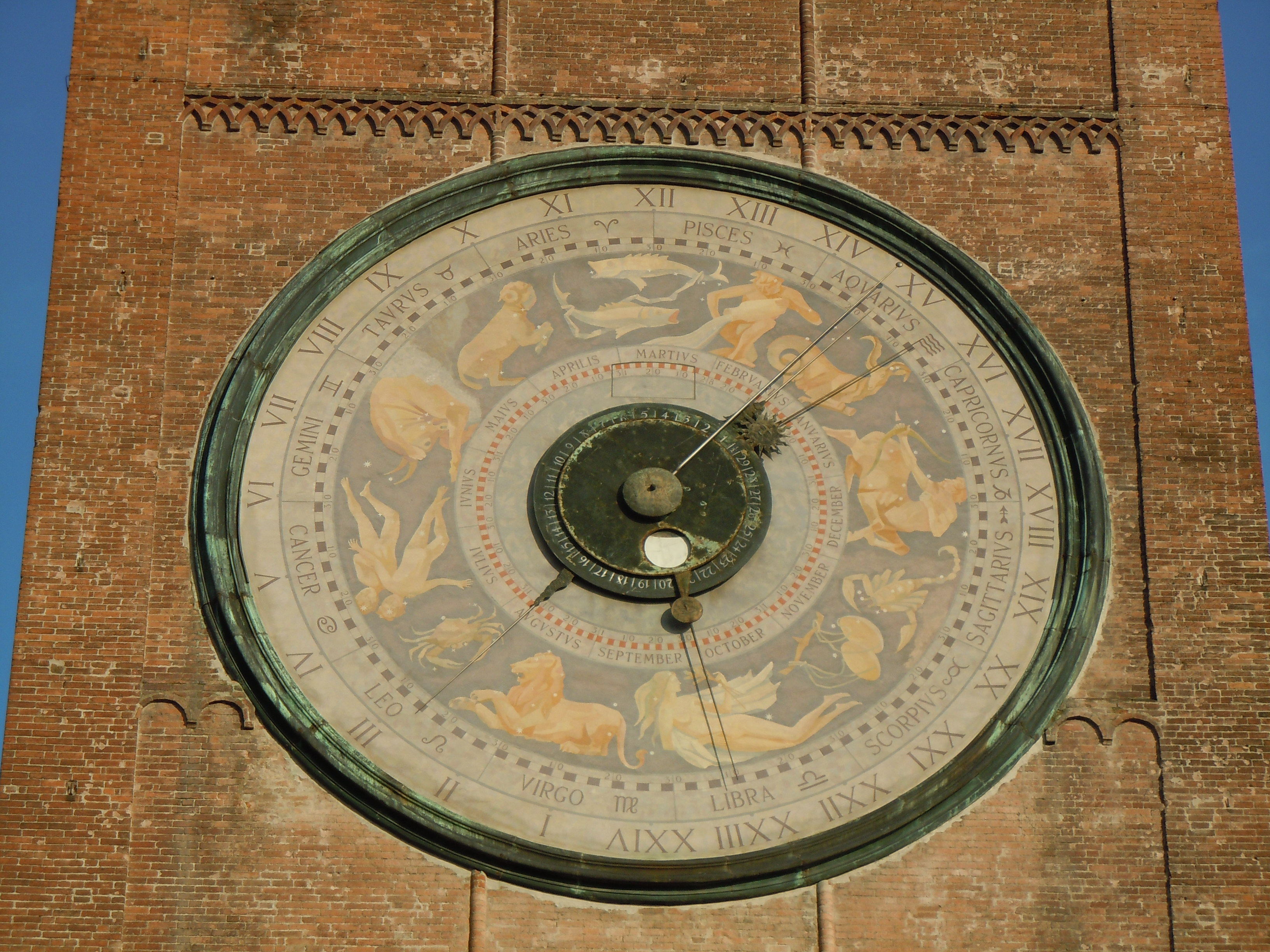 Cremona, orologio astronomico sul Torrazzo.